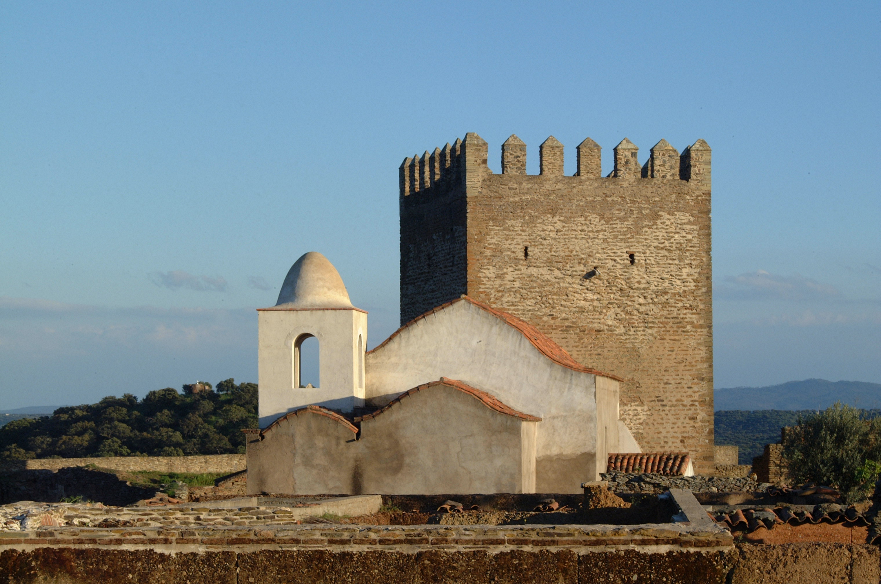 Noudar Barrancos portugal This is a photography of a Site of Community Importance in Portugal with the ID: PTCON0053 - Moura/Barrancos - Natura2000- Portugal. - Moura/Barrancos - Natura2000- Portugal Natura2000 entry, - Moura/Barrancos - Natura2000- Portugal EEA entry